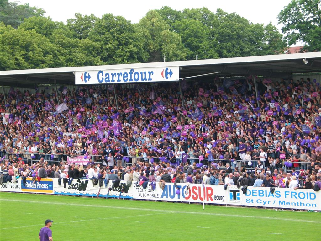 Demi-finale Trophée Jean Prat